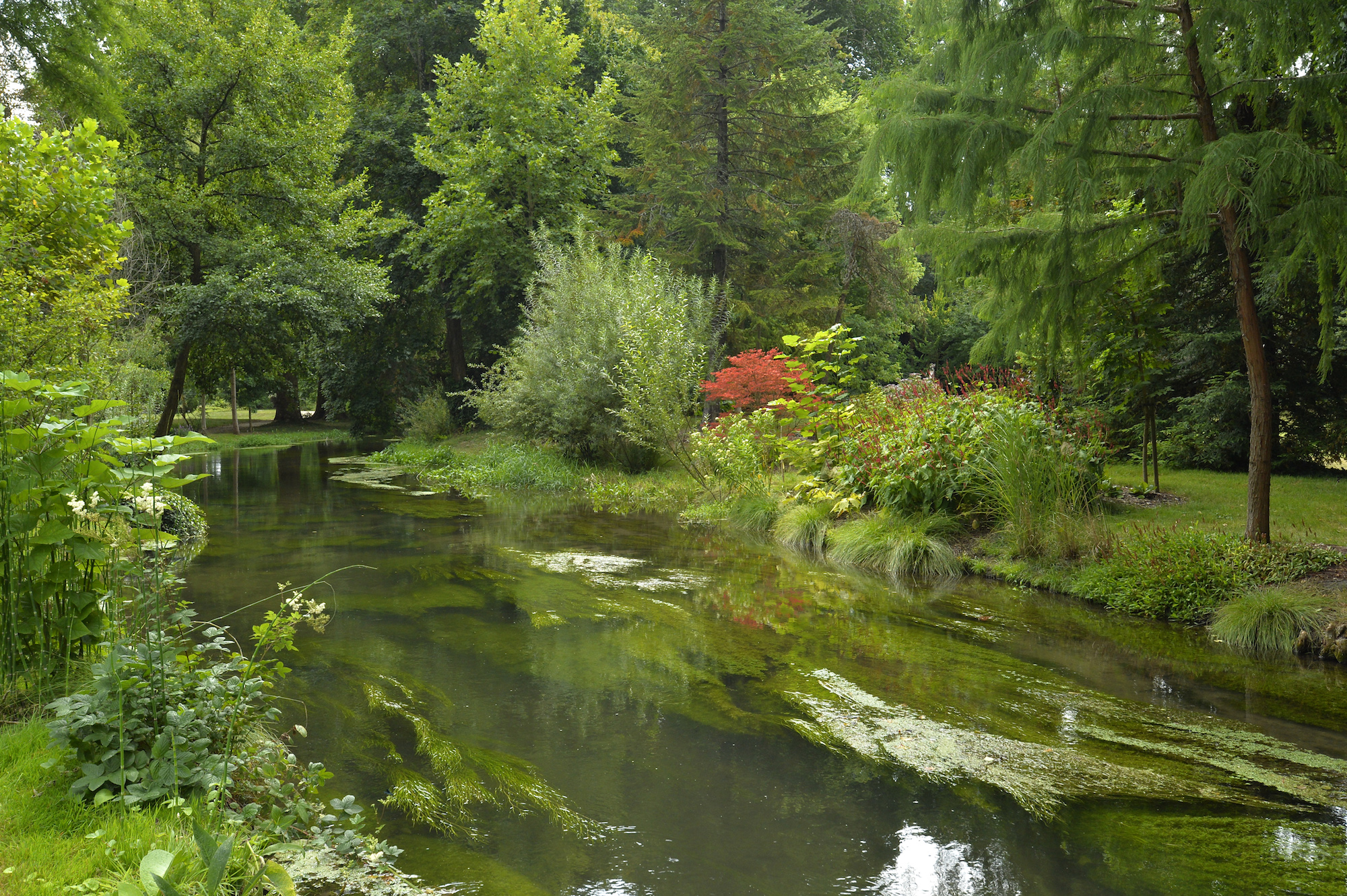 Acquigny, flânerie dans un parc romantique